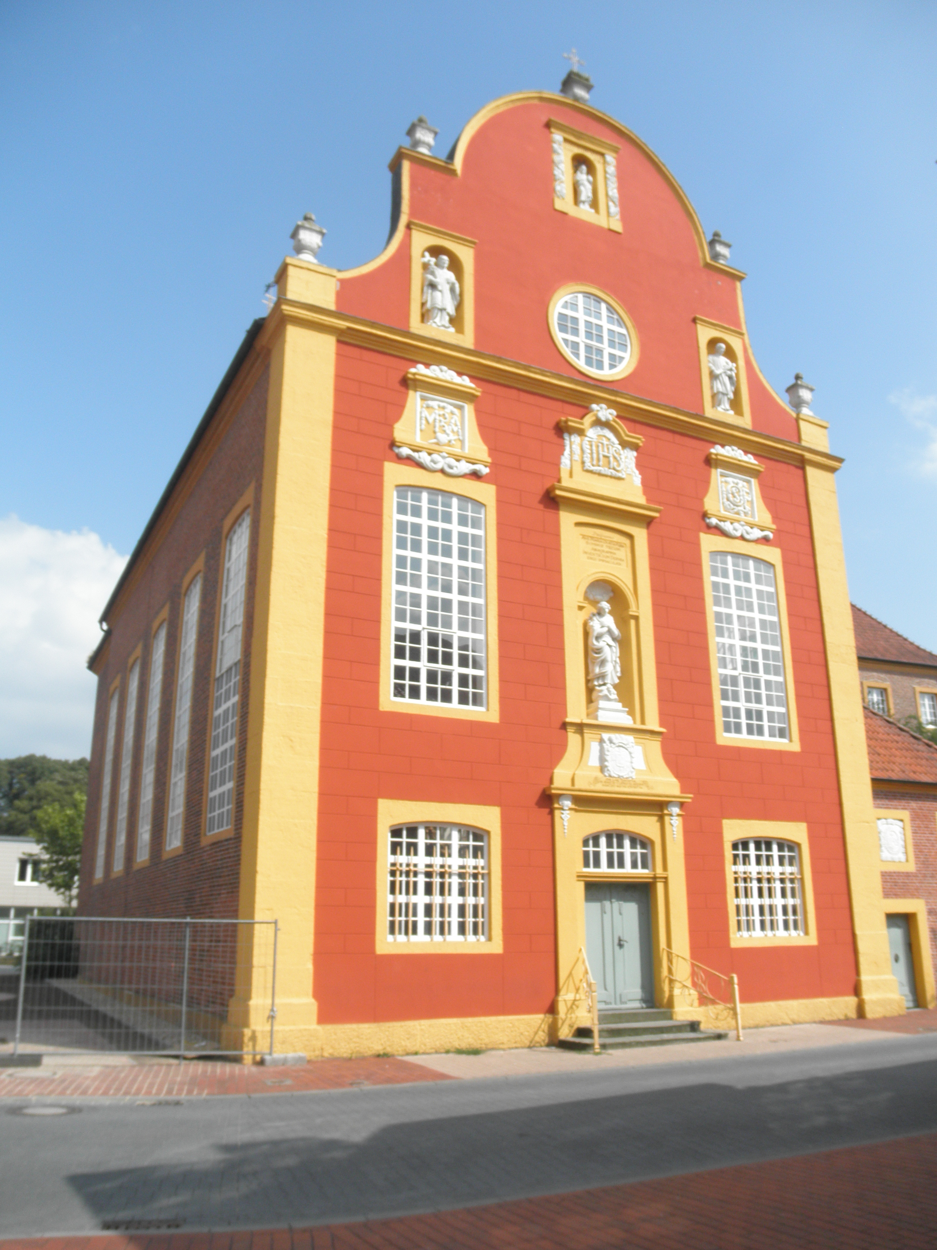 Gimnazia preĝejo en Meppen, Germanio